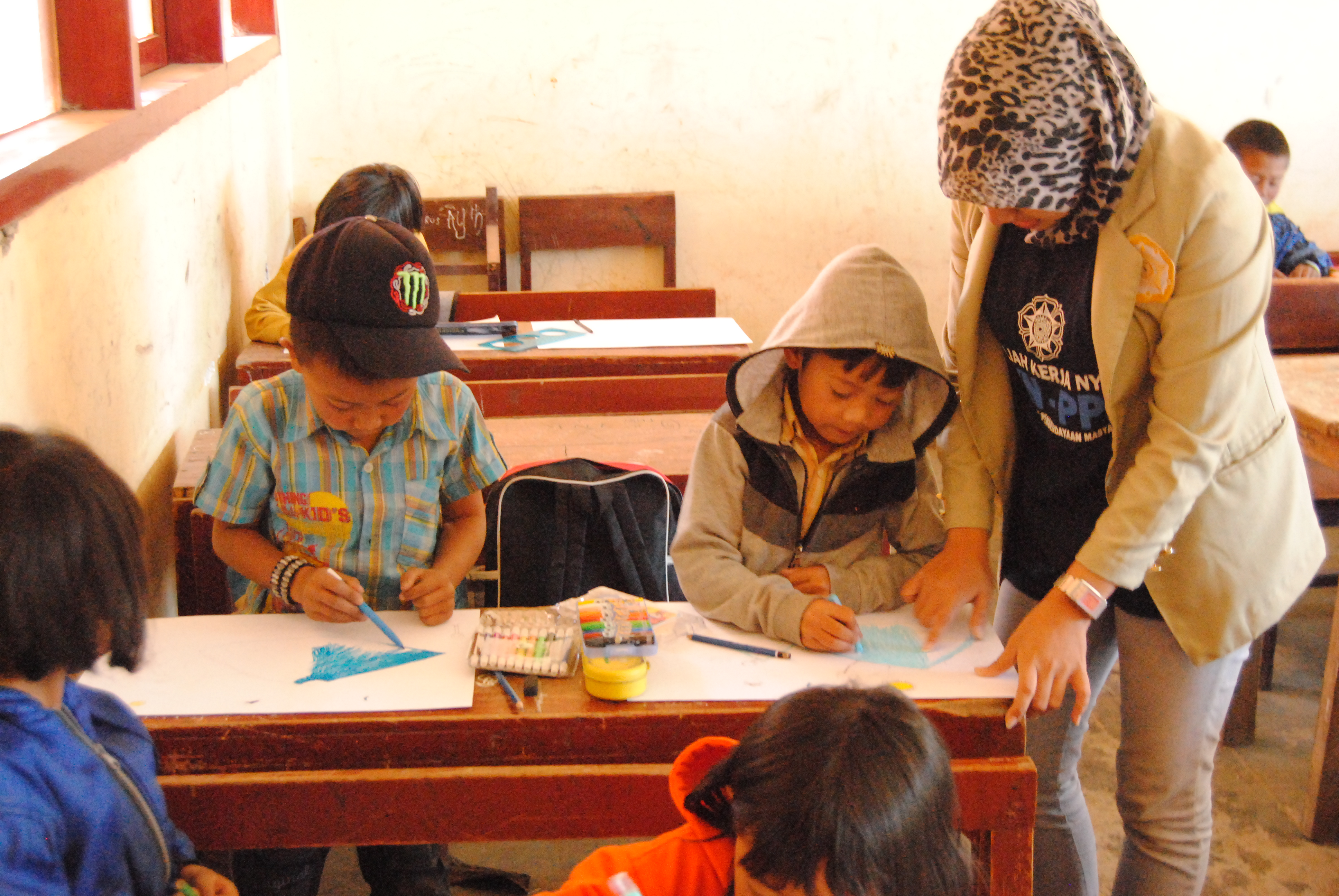 Seorang mahasiswi sedang melaksanakan program KKN dengan tema pendidikan.